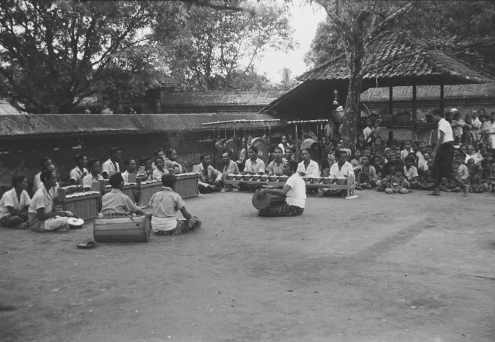 negatief. Gamelanorkest tijdens een ceremonie in een tempel waar heilige palingen worden vereerd, Lingsar